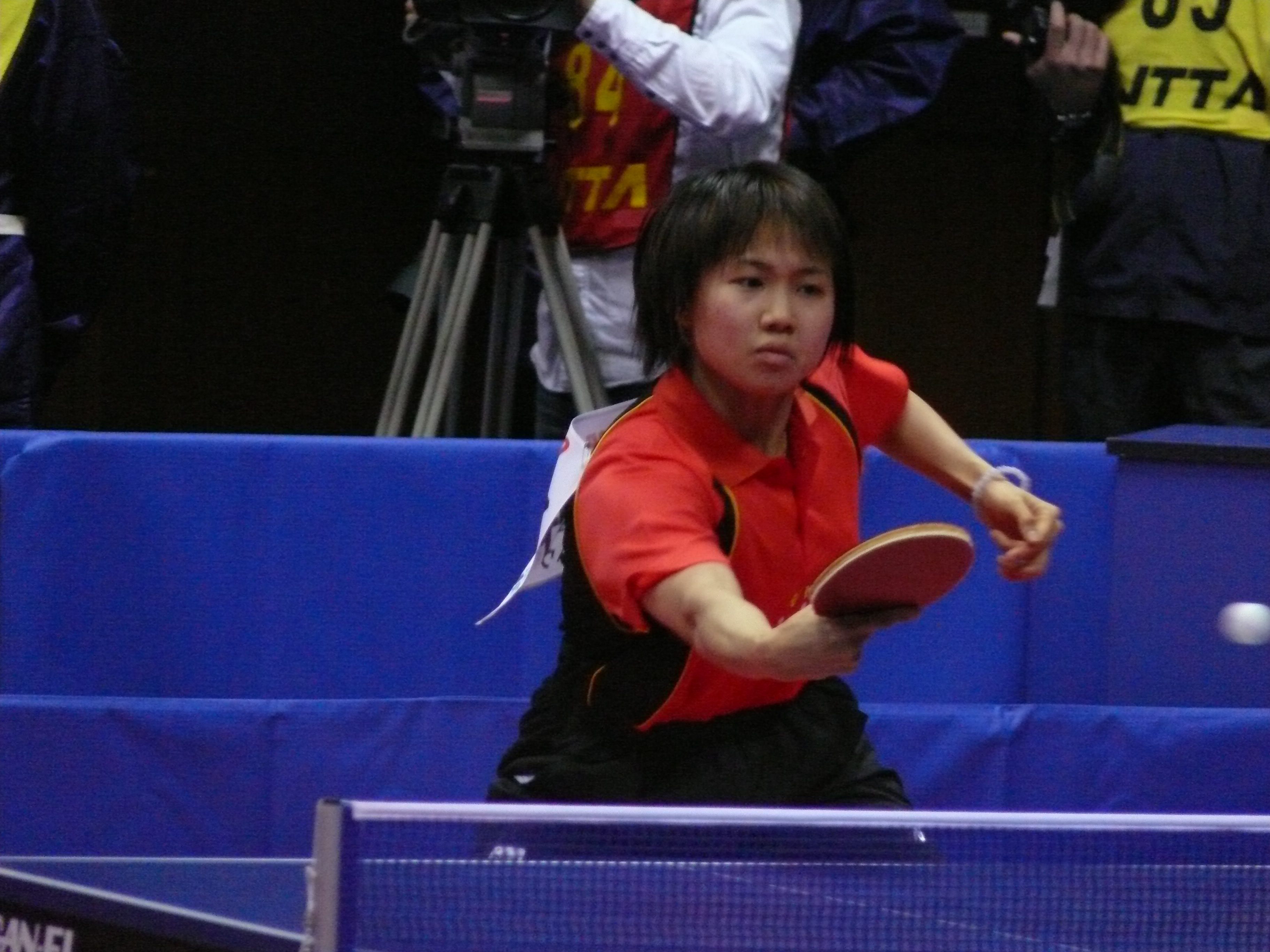 平野早矢香